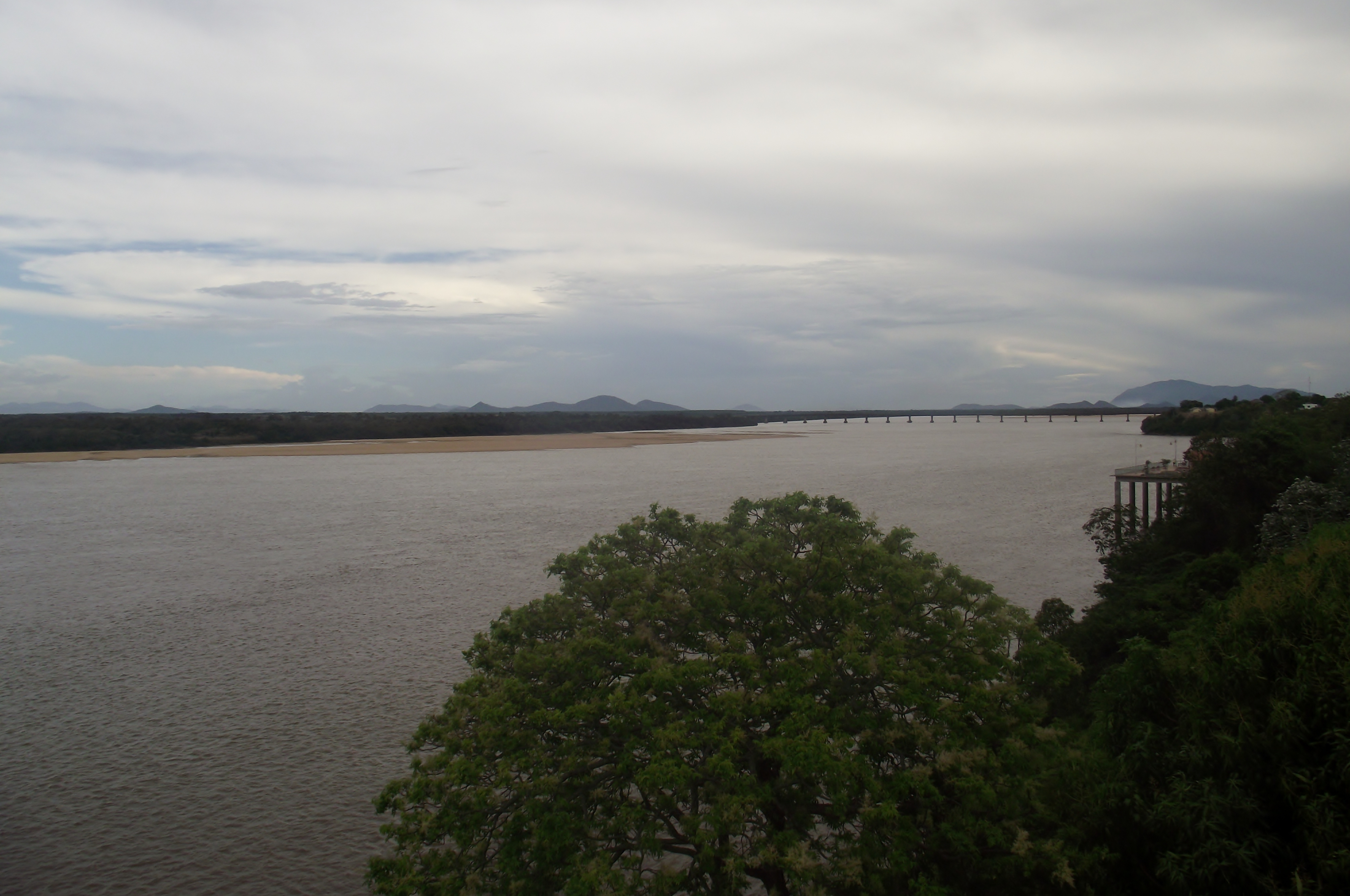 Branco River in Boa Vista, Roraima, Brazil.